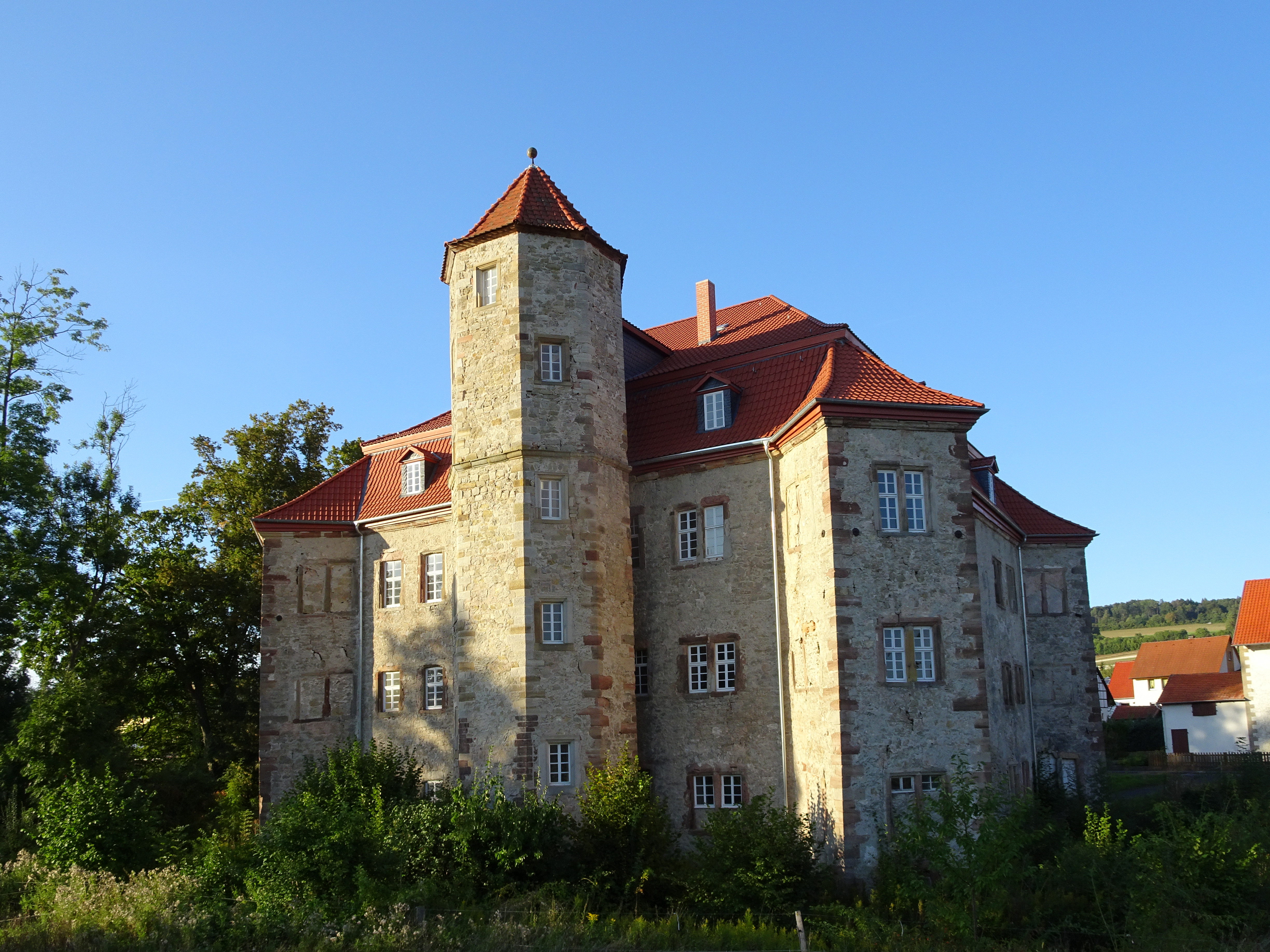 Ringgau-Netra im nordhessischen Werra-Meißner-Kreis. Das ehemalige Schloss. "An Stelle einer alten Wasserburg errichten die Herren von Boyneburg Ende des 16. Jahrhunderts ein wehrhaftes Schloss. Der Grundriss zeigt einen quadratischen Querschnitt, dessen Ecken gleich einem Festungsbau durch vorgelagerte Erker verstärkt werden. An der Südseite erhebt sich ein polygonaler Treppenturm. In das abschließende Mansarddach wurden kleine Erker eingefügt. Als eine befestigte Schlossanlage ist das Gebäude aus künstlerischen, städtebaulichen und geschichtlichen Gründen zu erhalten." ext aus: Denkmaltopographie Bundesrepublik Deutschland, Kulturdenkmäler in Hessen. Werra-Meißner-Kreis I, Altkreis Eschwege. Peer Zietz, Thomas Wiegand, Braunschweig: Vieweg Verlag, 1991, ISBN 3-528-06240-1. Am Schloss vorbei führen der Herkules-Wartburg-Radwanderweg und der Elisabethpfad.